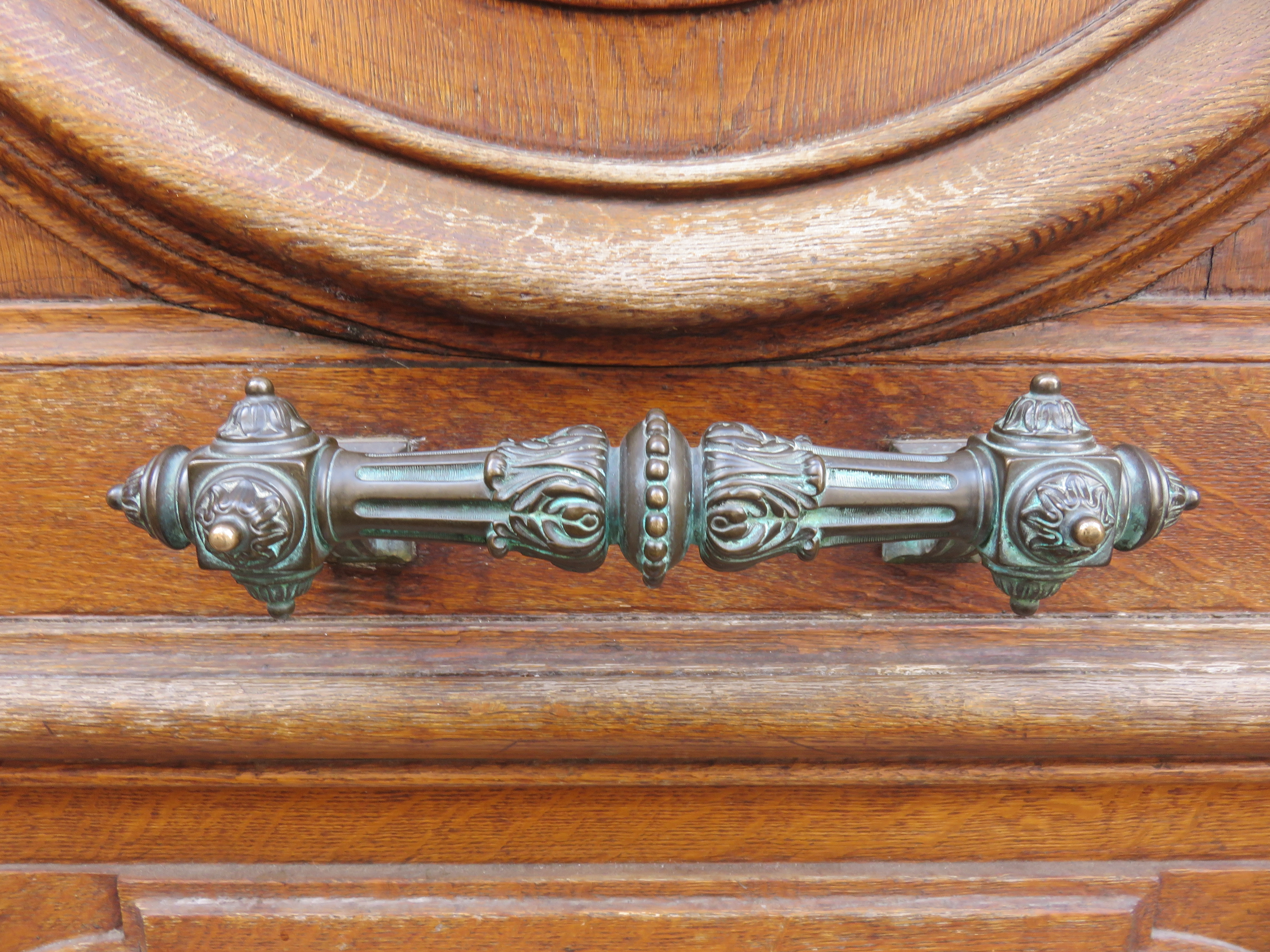 Détail de la porte de la villa Jurietti, rue Hubert Colombier, à Vichy (Allier, France).